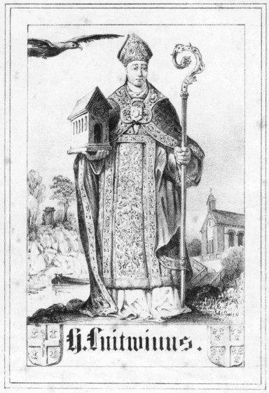 Der Heilige Liutwin / Lutwin / Ludwin / Lutwinus (von Mettnich), bishop of Trier, Reims and Laon — Wallfahrtsbild (Liutwin)